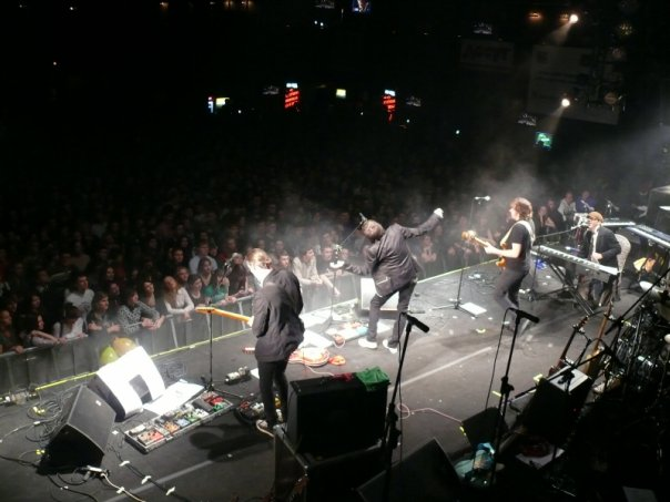 разогрев